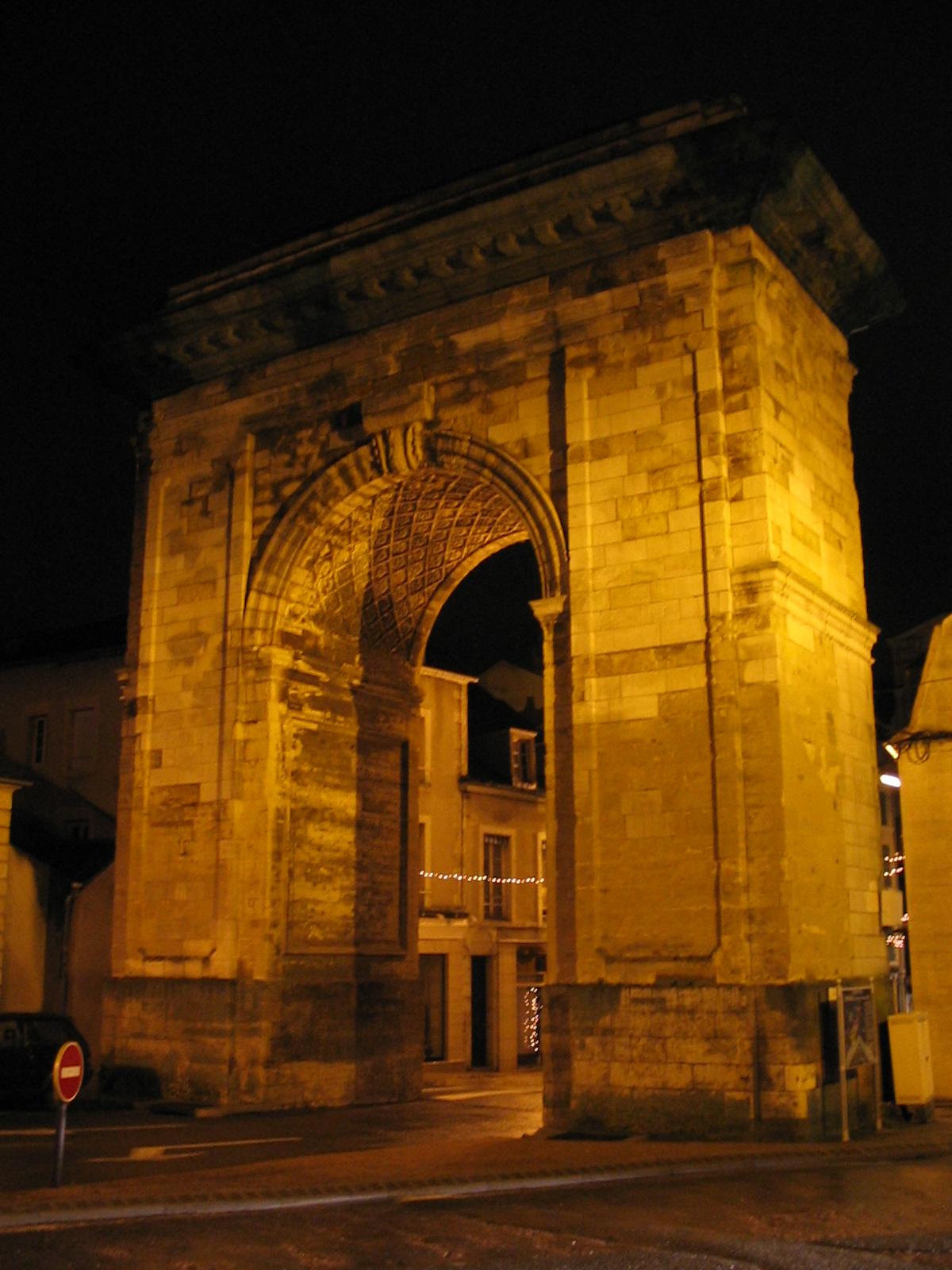 Porte de Paris à Nevers (58). Je suis l'auteur du cliché pris en décembre 2004